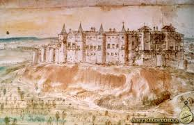 Vista de Madrid: dibujo definitivo (1562) (detalle con el Real Alcázar de Madrid. Realizado a pluma con tinta sepia y aguados de color en papel. Se conserva en la National-bibliothek de Viena (Ms. Min. 4135ro). El dibujo completo mide 382 x 1385 mm.